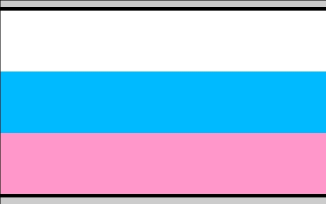 Burschenfarben des Corps Silesia Breslau